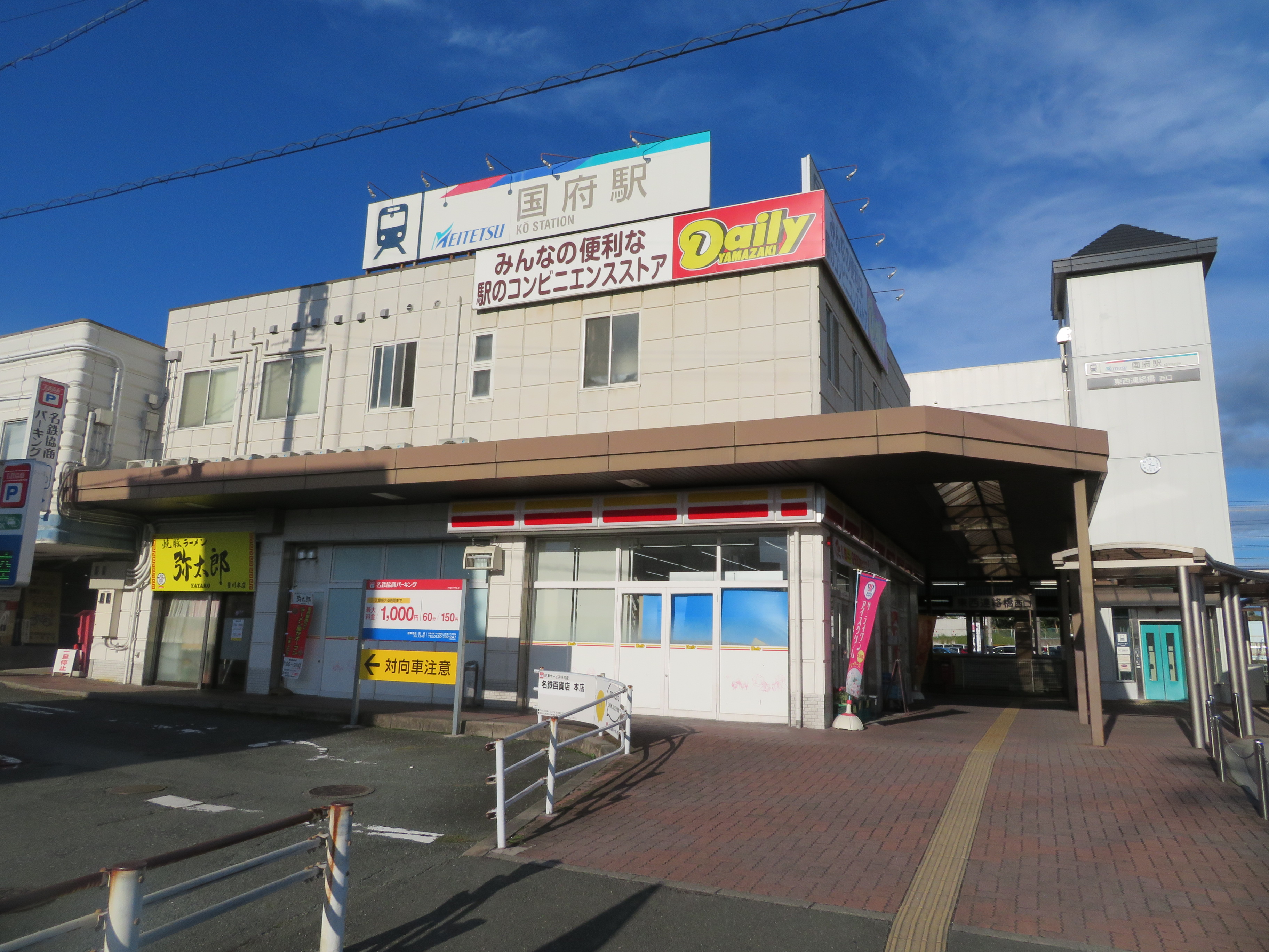 国府駅。愛知県豊川市久保町